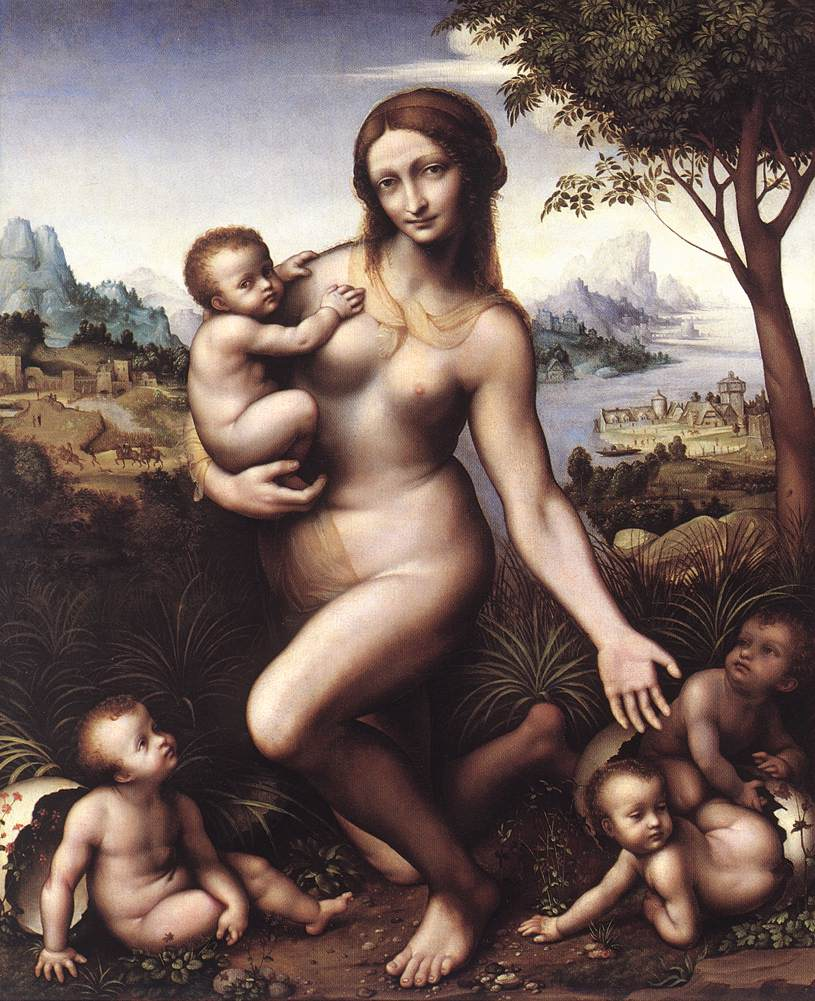 Leda mit ihren zeusgeborenen Kindern: Kastor, Pollux, Helena und Klytämnestra